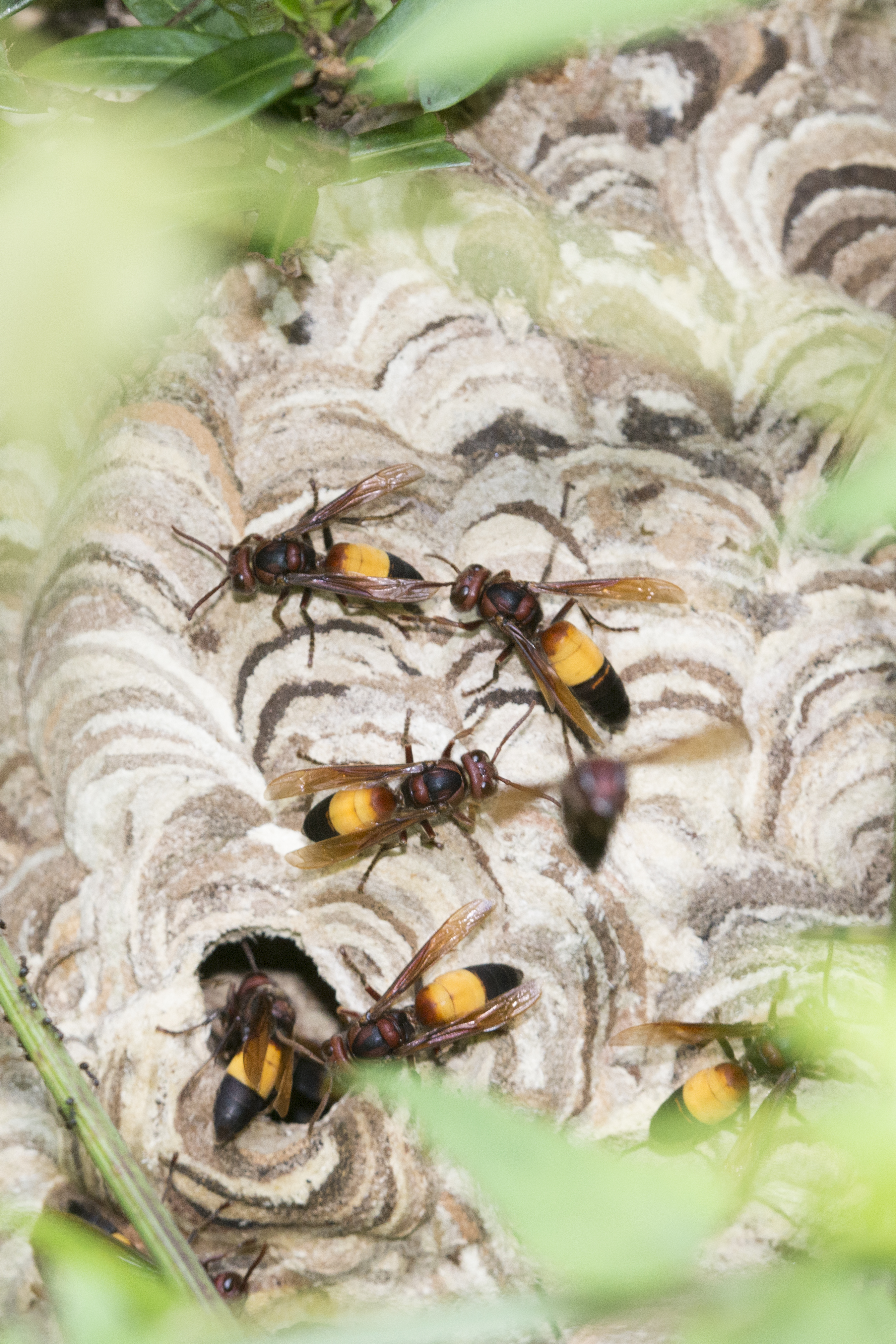 Vespa affinis (Linnaeus, 1764) 黃腰虎頭蜂